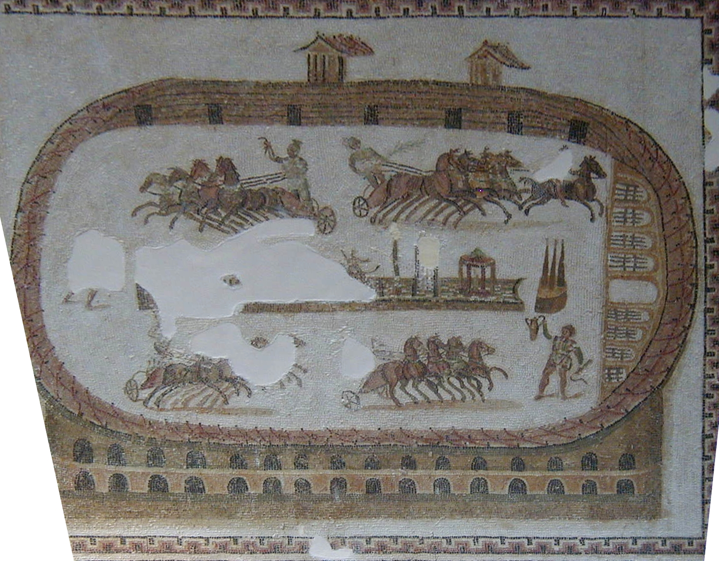 Mosaïque de la Course de char dans le cirque de Carthage, Carthage, IIe-IIIe siècle